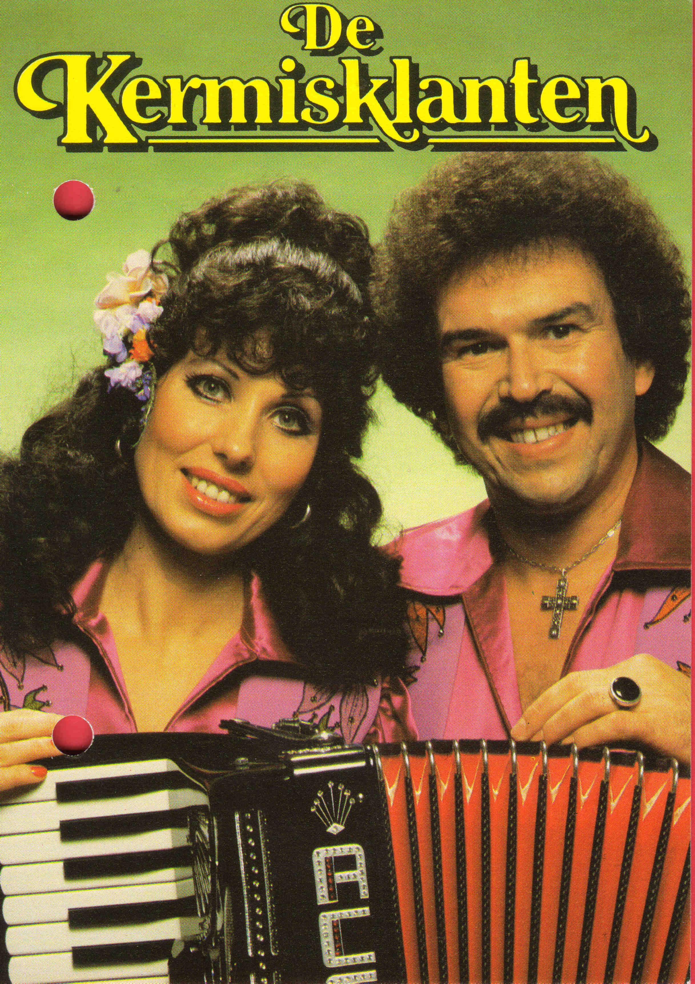 De Kermisklanten was een Nederlands accordeonduo, dat ook veel succes oogstte in Duitsland (als Die Kirmesmusikanten). Het duo bestond uit Henny van Voskuylen (23 mei 1941-12 januari 2010) en Coby van Mol (22 juli 1944). Zij leerden elkaar kennen tijdens een afzonderlijk optreden op de bühne en besloten als duo verder te gaan. Ook privé klikte het goed en op 15 mei 1964 traden zij met elkaar in het huwelijk.